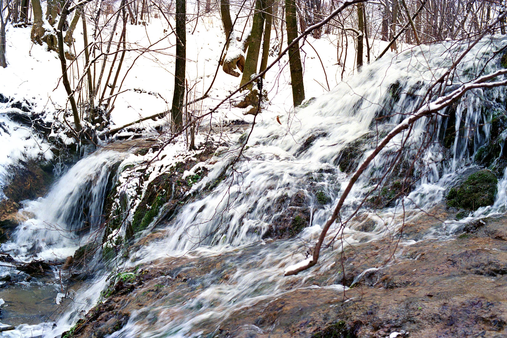 Wanfried-Elfengrund Wasserfall im Jan. 1987